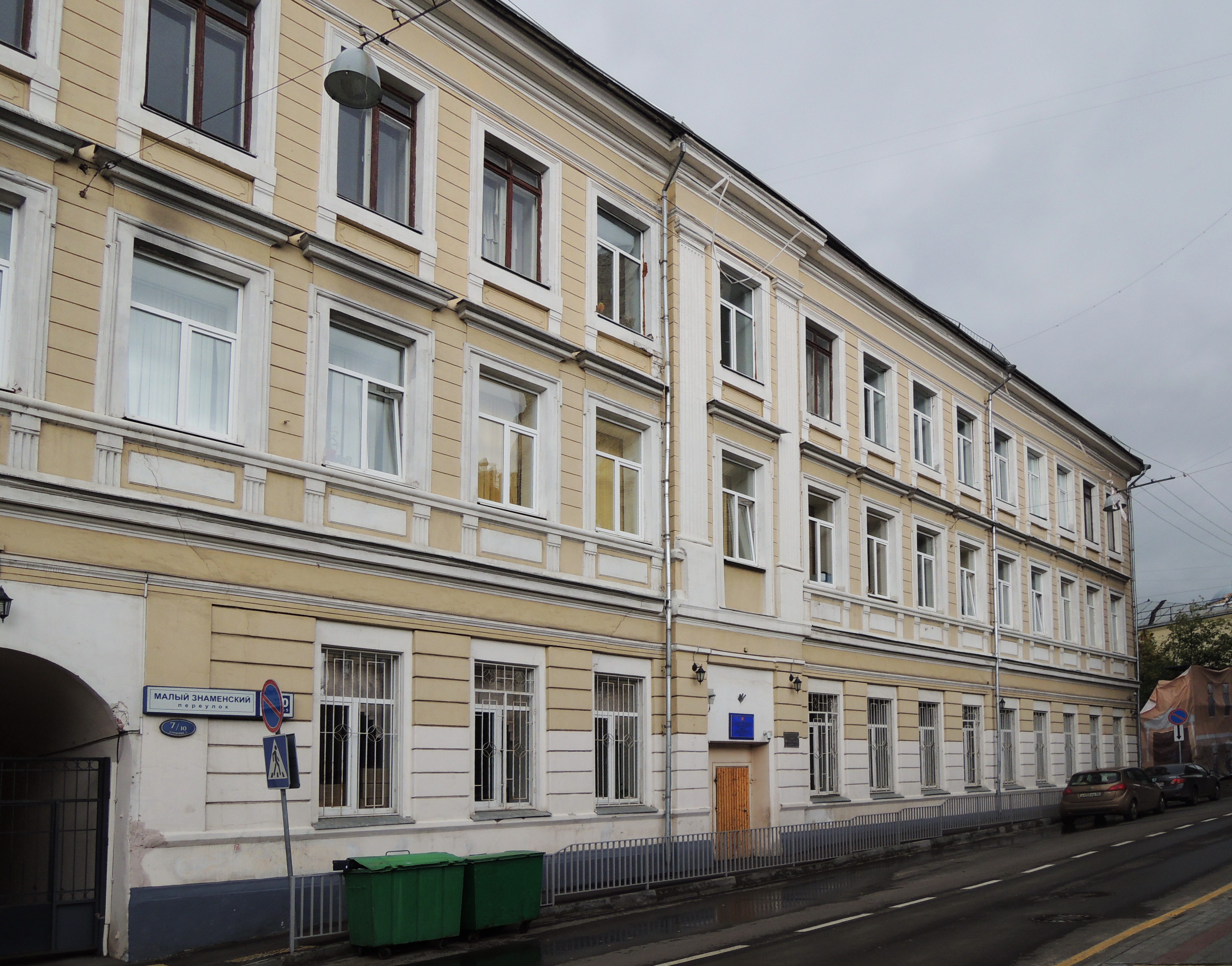 Школа № 57 (Москва)